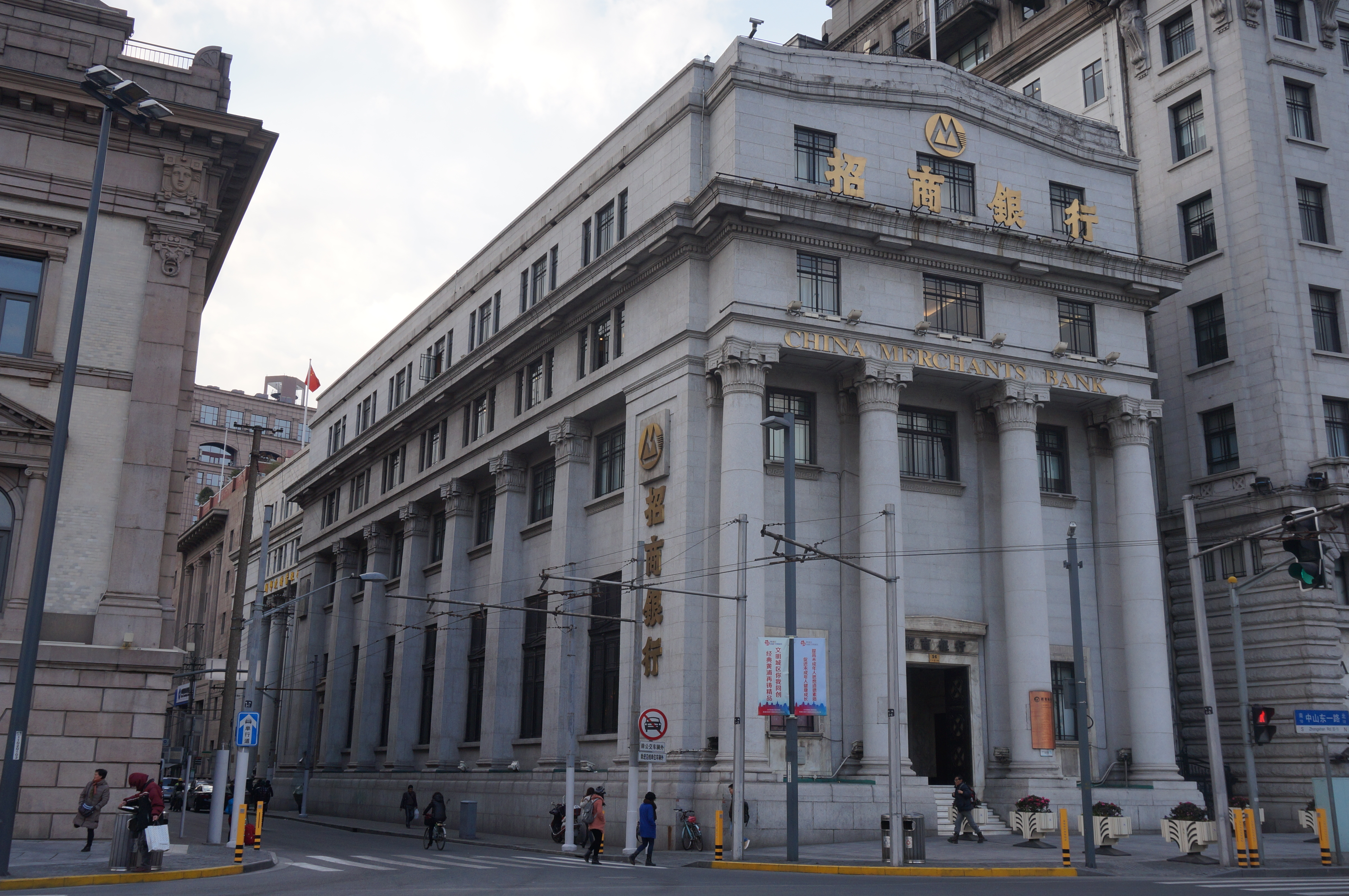 外滩台湾银行大楼